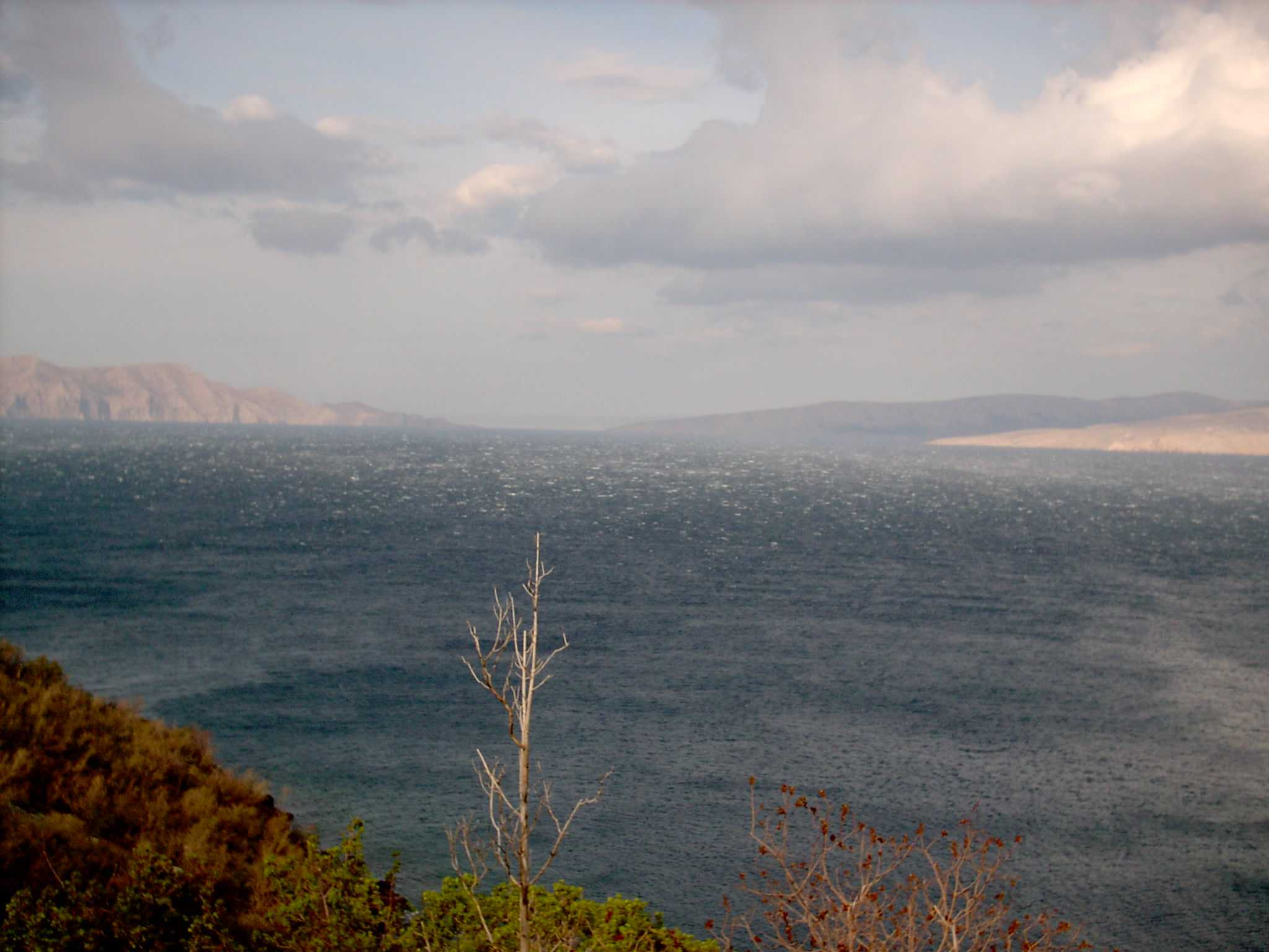 Von der Bora aufgewühltes Meer in der Nähe der kroatischen Stadt Senj, Blick auf die vorgelagerten Inseln